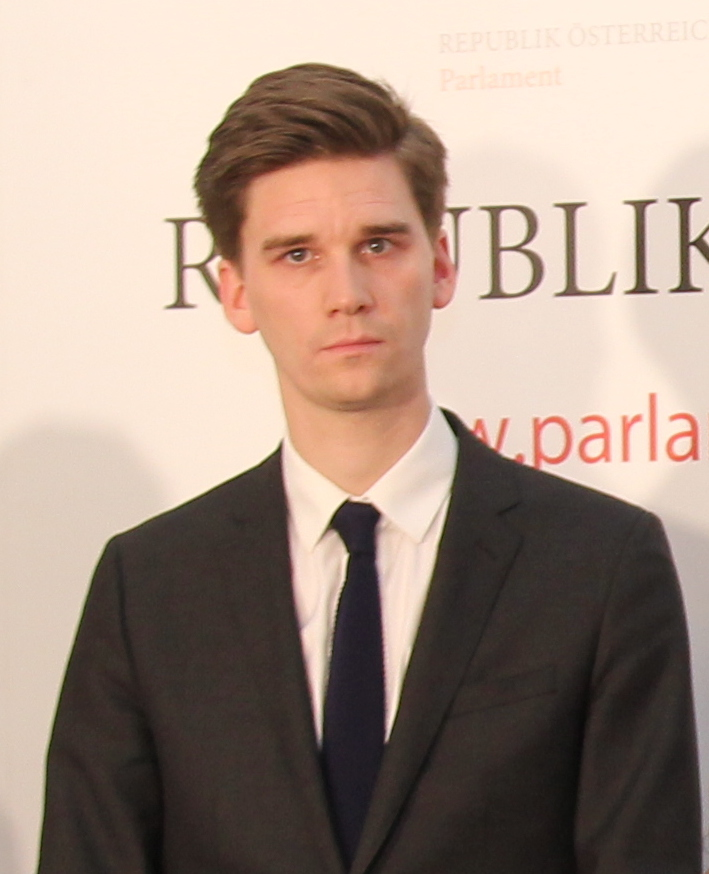 Gemeinsame Pressekonferenz mit SPÖ-Bildungssprecherin Sonja Hammerschmid und den Bildungssprechern der Neos und Jetzt und Experten im Anschluss an das Hearing im Unterrichtsausschuss zum Pädagogik-Paket.